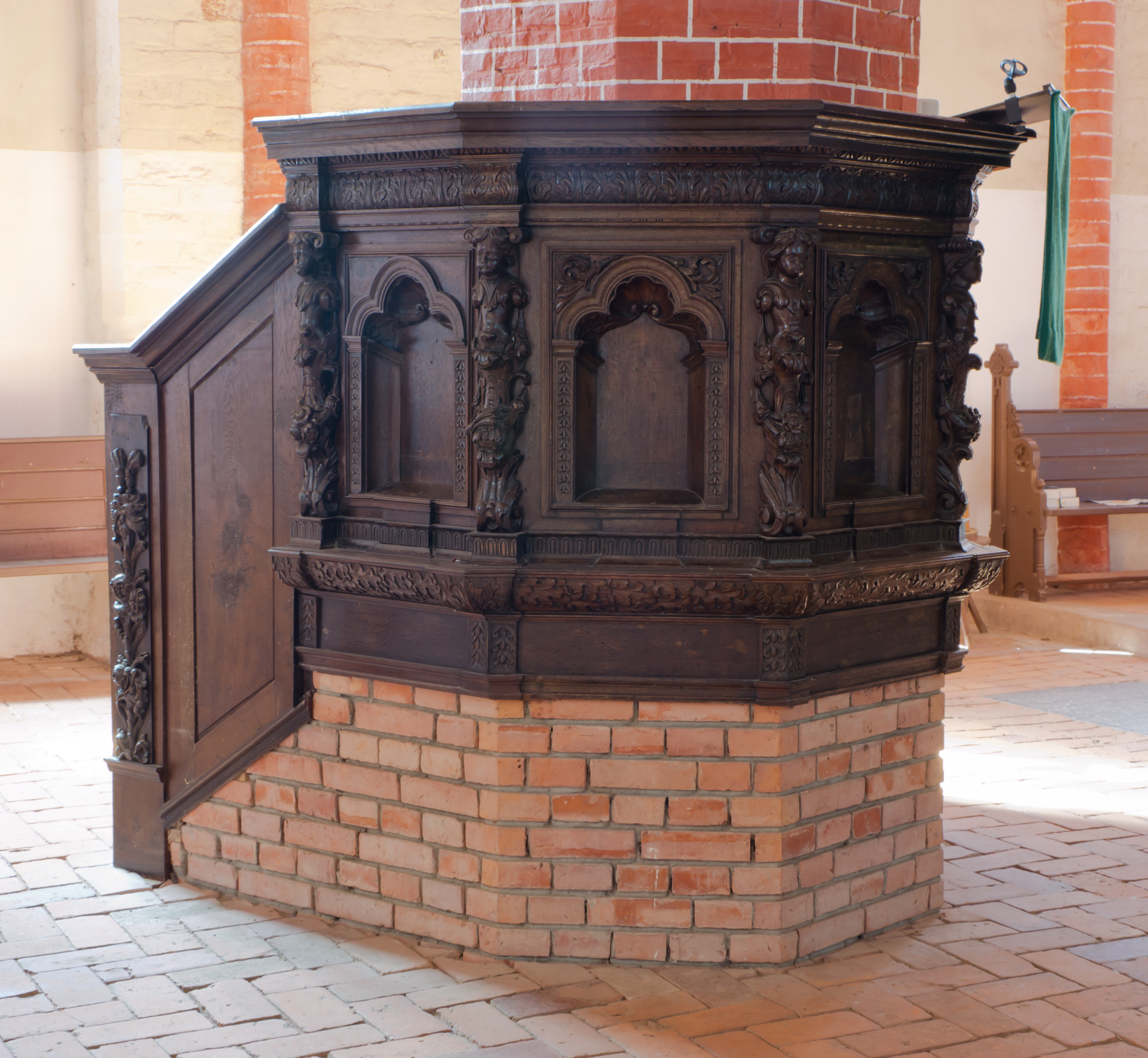 Steffenshagen Kirche Kanzel